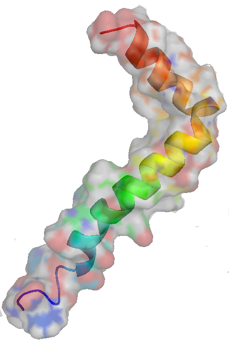 β-amyloid transmembrane structure.